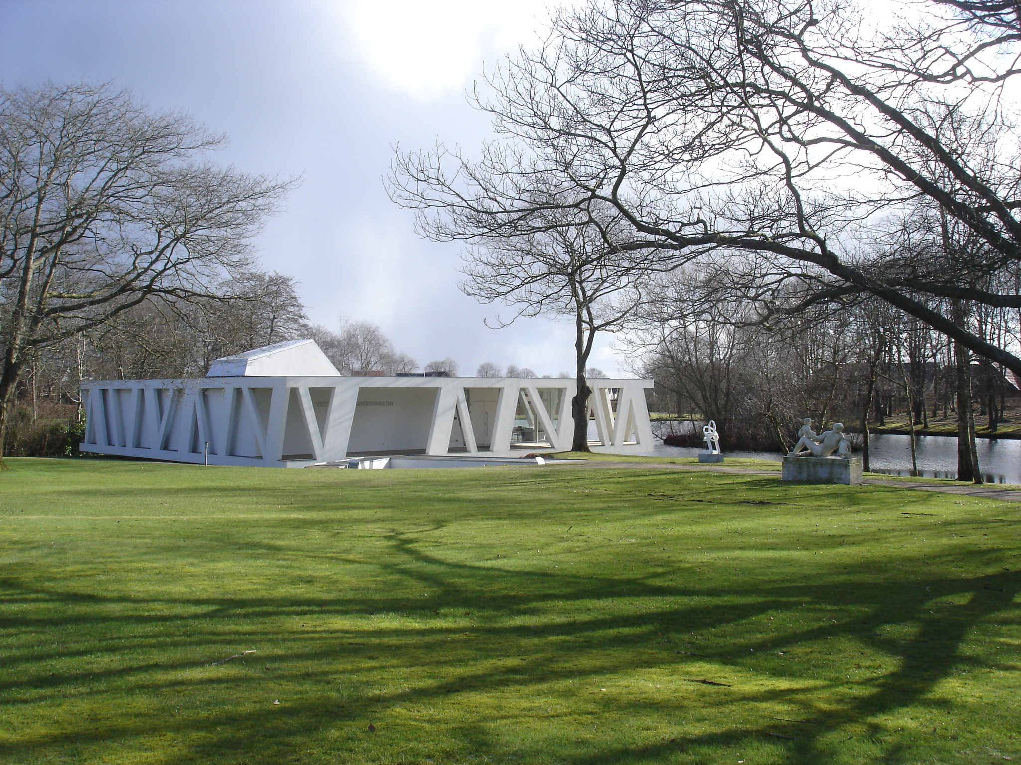 Vestjyllands Kunstpavillon i Videbæk fra NV